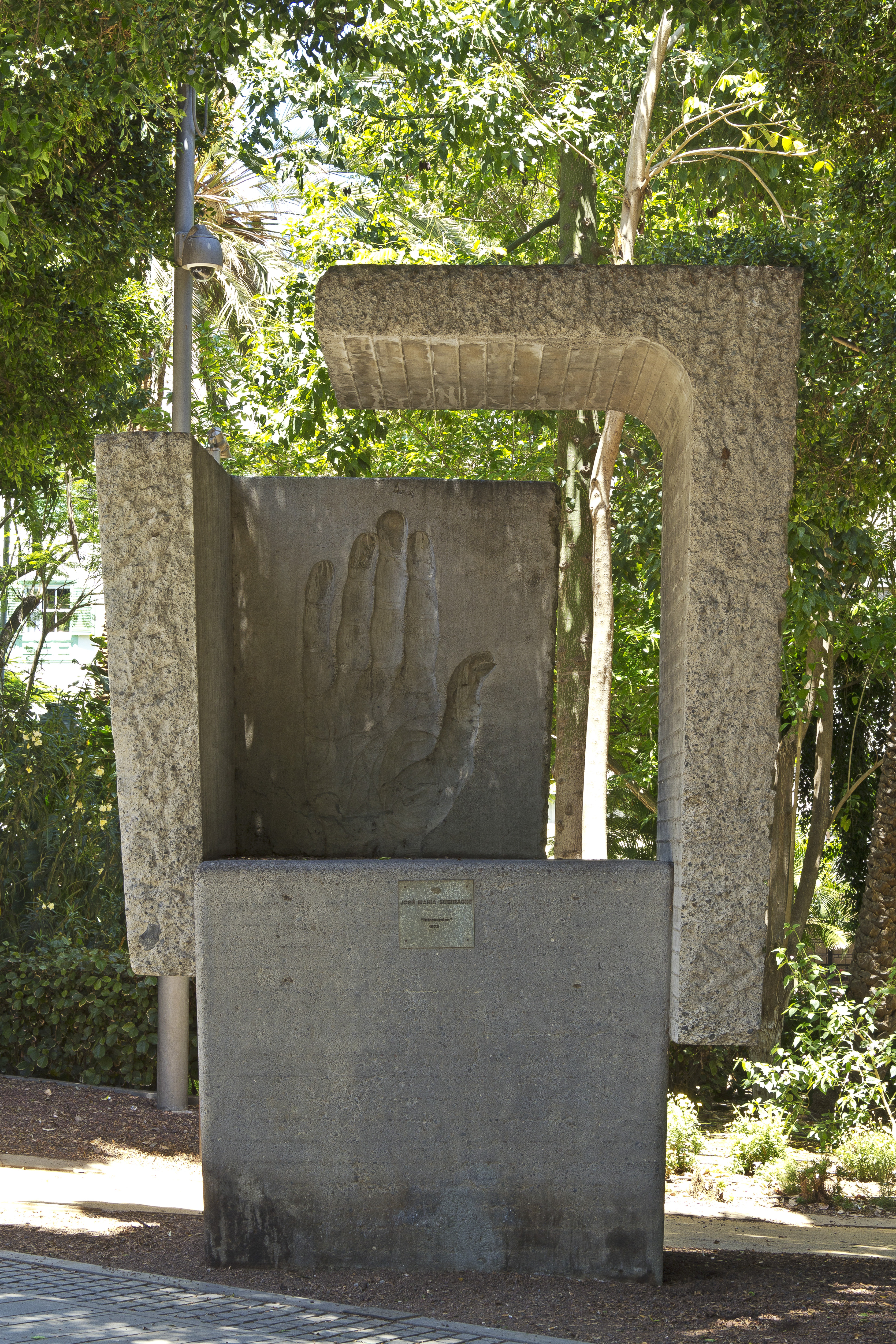 Die Plastik „Introversión” des 1927in Barcelona (Spanien) geborenen Künstlers Josep María Subirachs wurde im Jahr 1973 im Rahmen der „Exposición Internacional de Escultura en la Calle“ der Architektenkammer der Kanarischen Inseln im Parque García Sanabria in Santa Cruz de Tenerife aufgestellt . Die Maße sind 3,74 m x 2,38 m x 2,48 m.